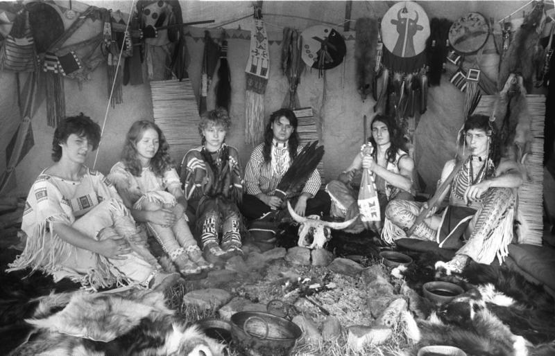 Zum Beitrag: Im Rhythmus der Trommeln.../ Indianische Zeremonien im Glanz der Thüringer Mittagssonne ADN-ZB-Kasper/ 8.7.1988 Indianistik-Freunde aus Prag, die zum 30. Indian-Council Anfang Juli in Triptis, Bez. Gera, angereist waren, haben sich um das Feuer in ihrem Zelt versammelt: traditionell links die Frauen, rechts die Männer.